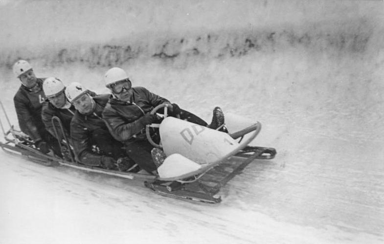 Erich Hansen, Kirchner, Feist, Oswald Schelter Zentralbild Quasch. 16.2.1953 IV. Wintersportmeisterschaften der Deutschen Demokratischen Republik für Frieden, Einheit, Demokratie und Sozialismus vom 10.-15.2.1953 in Oberhof UBz: Die Siegermannschaft im Viererbob: Erich Hansen, Kirchner, Feist, Schelter während des Laufes.